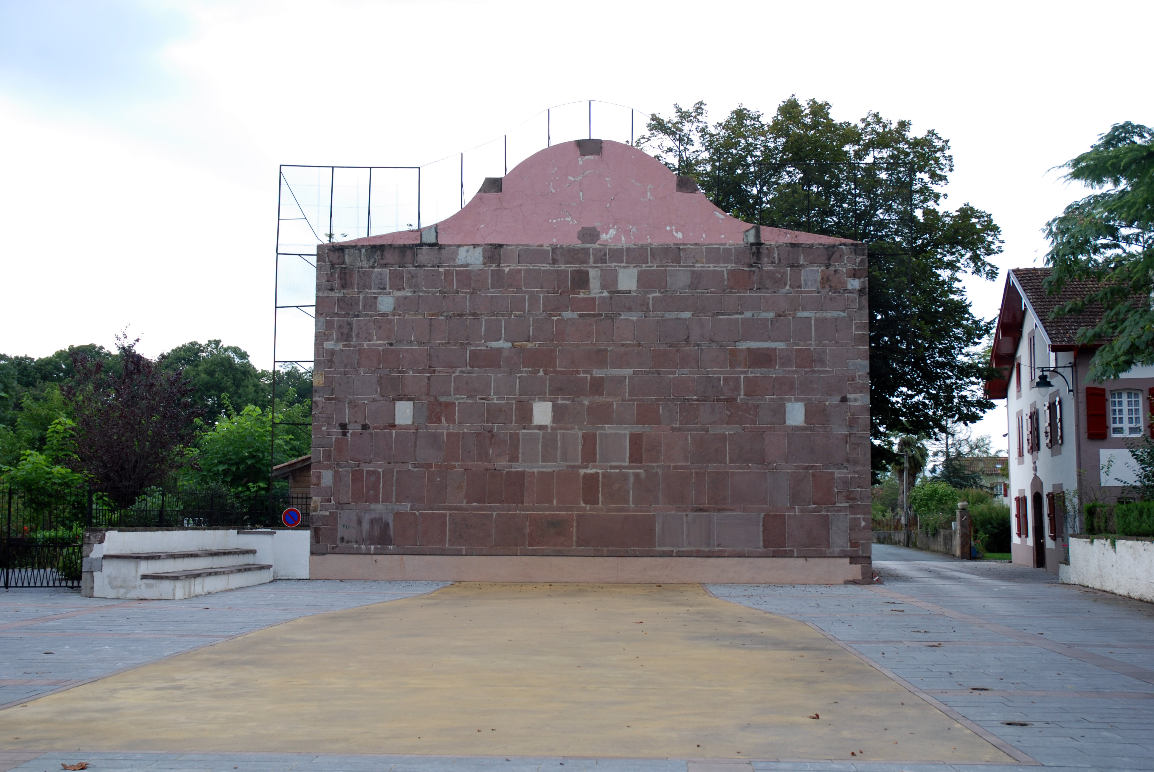 Saint-Jean-le-Vieux, le fronton place libre